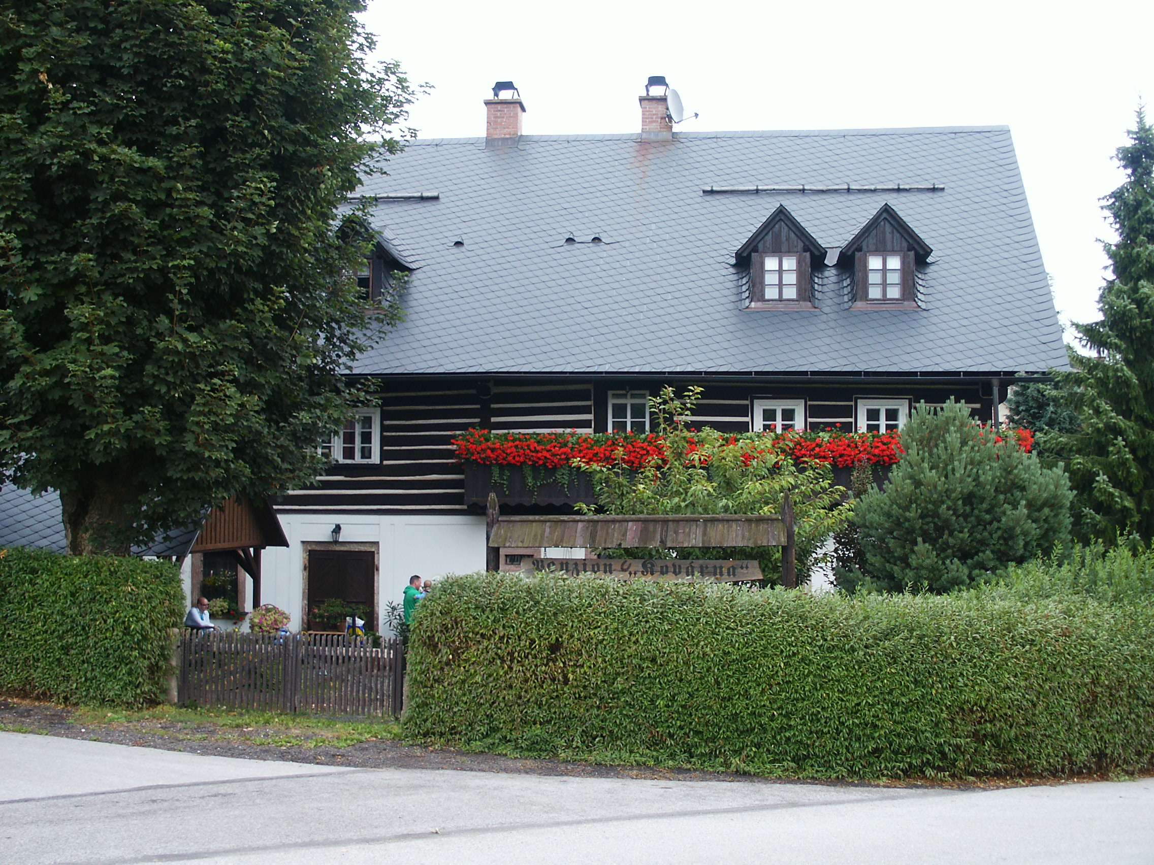 Kovárna (Vidochov), Vidochov 4